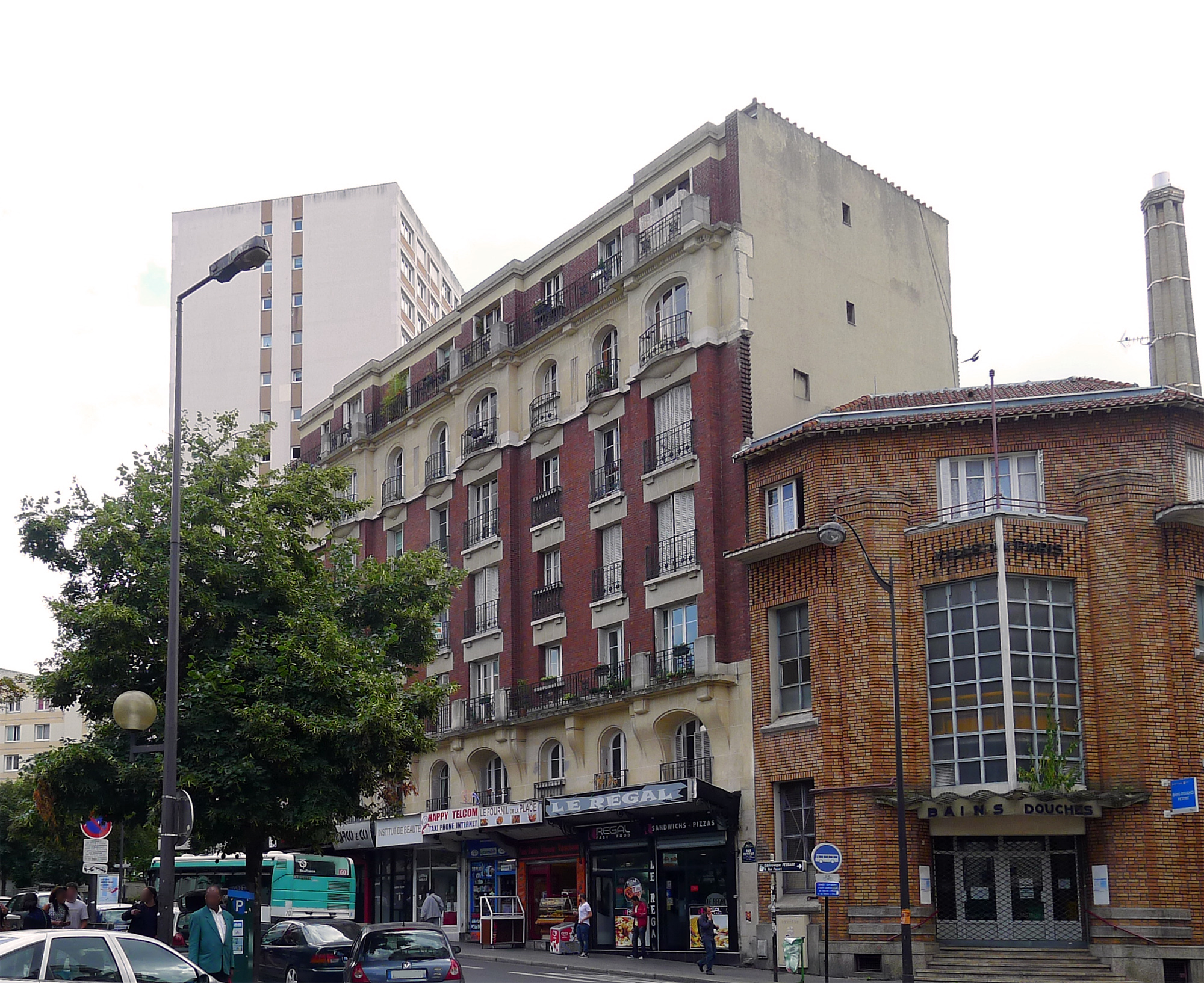 Rue Petitot - Paris XIX